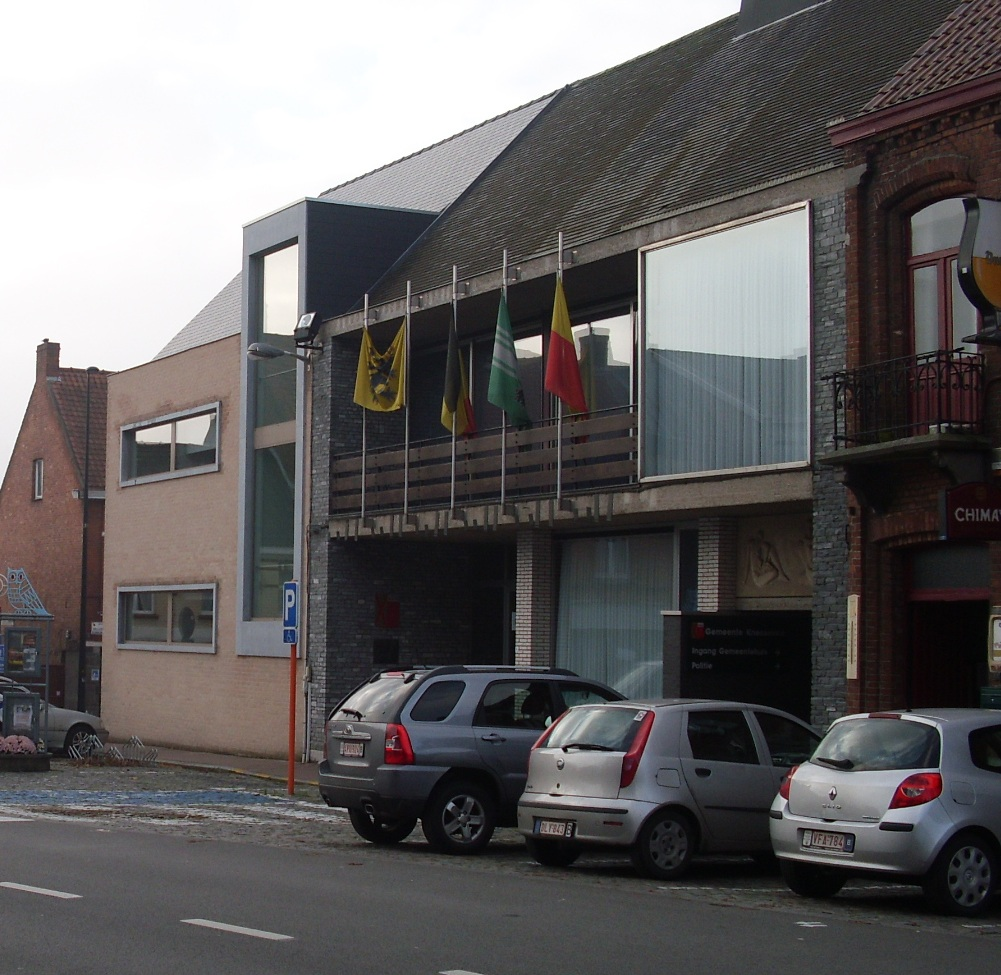 Gemeentehuis Knesselare - De Plaats 14 - Oost-Vlaanderen - Vlaanderen - België